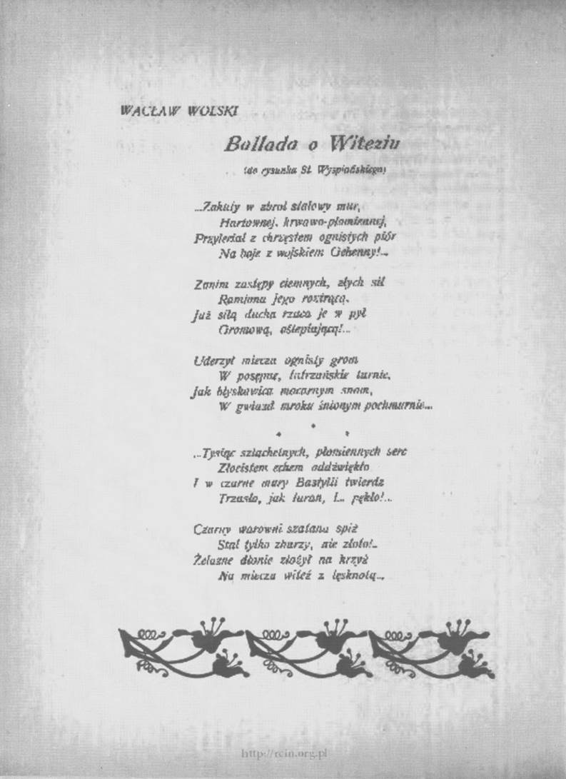 Kopia strony 88 z czasopisma "Witeź" (1908); wiersz W. Wolskiego